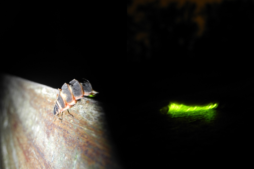 Ver Luisant